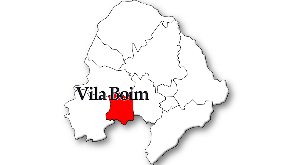 Evolução da População